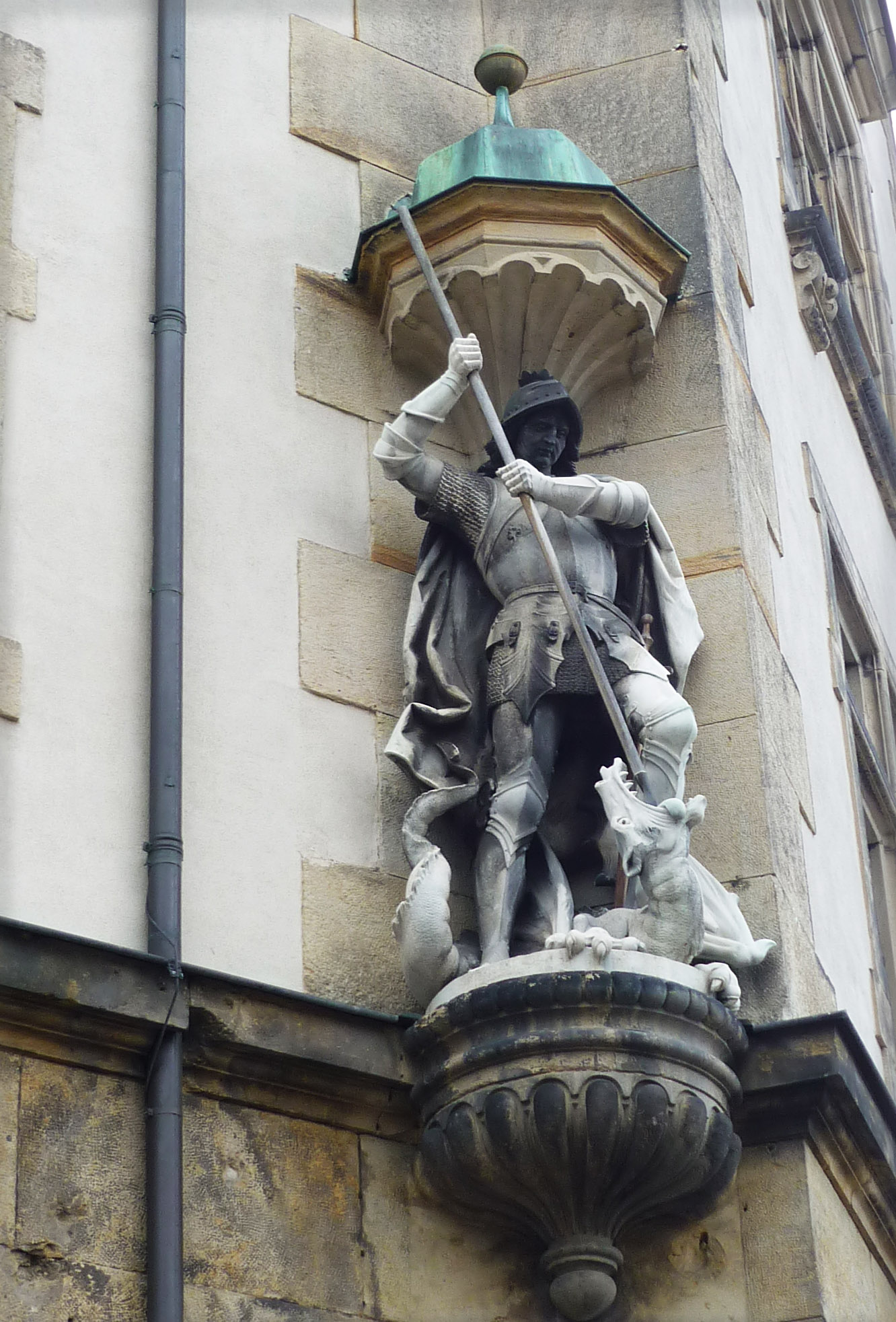 Sankt Georg im Kampf mit dem Drachen am Rathaus Dresden-Plauen